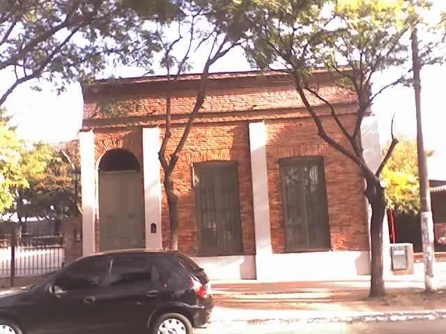 Casa Correa, construida en 1859, es la casa más antigua de Merlo.